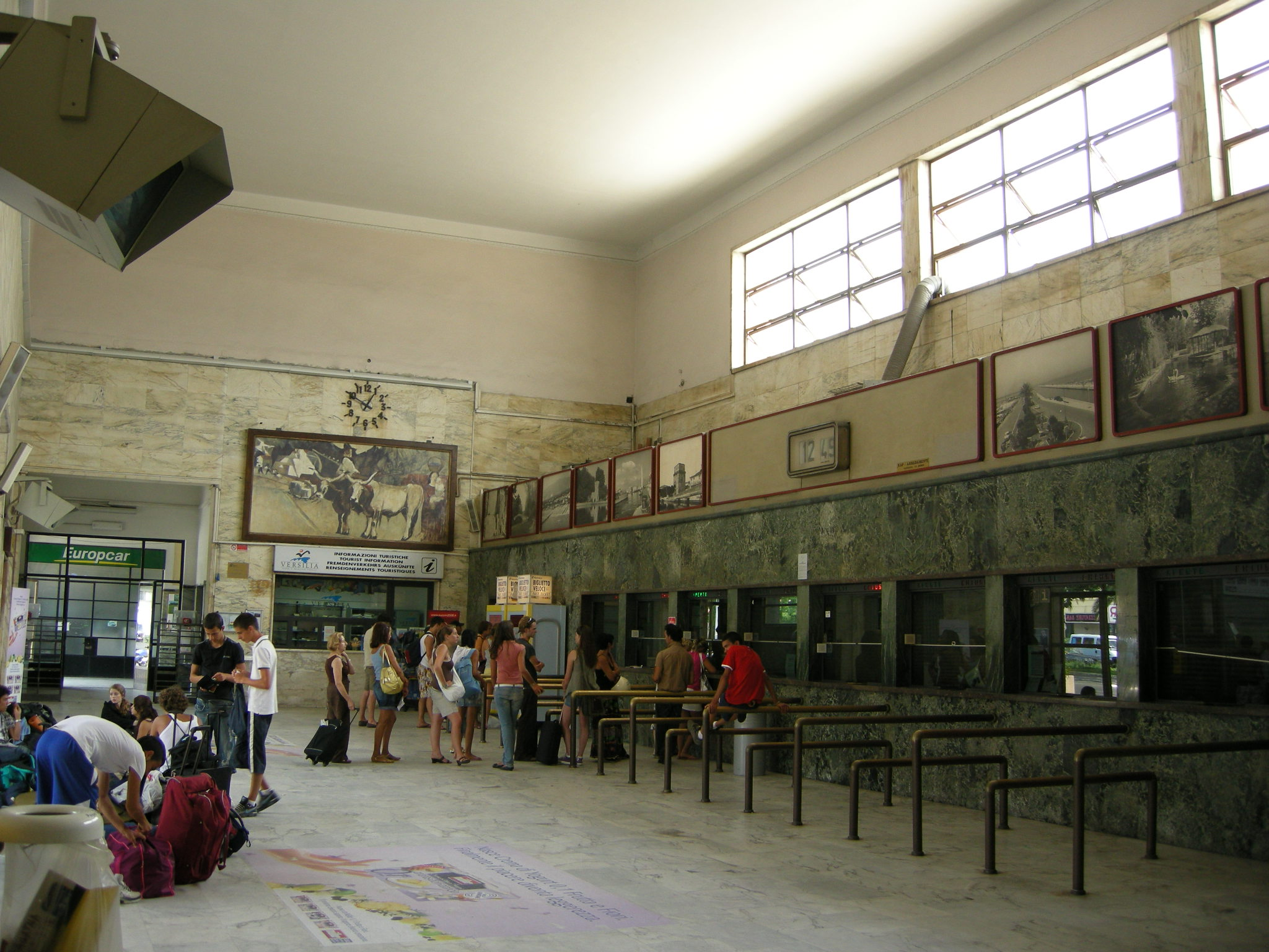 Stazione di viareggio, interno